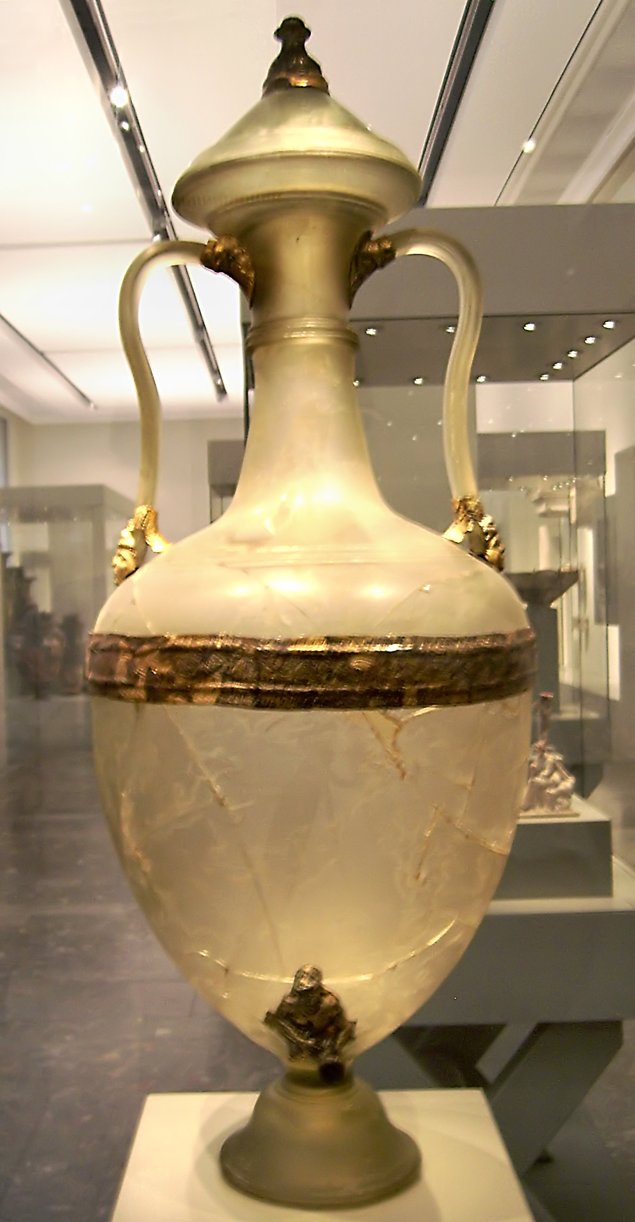 Hellenistische Glasamphora aus der 2. Hälfte des 2. Jahrhunderts v. Chr.; gefunden in Olbia; Antikensammlung Berlin/Altes Museum - seit 1913 - Inventarnummer 30219,254